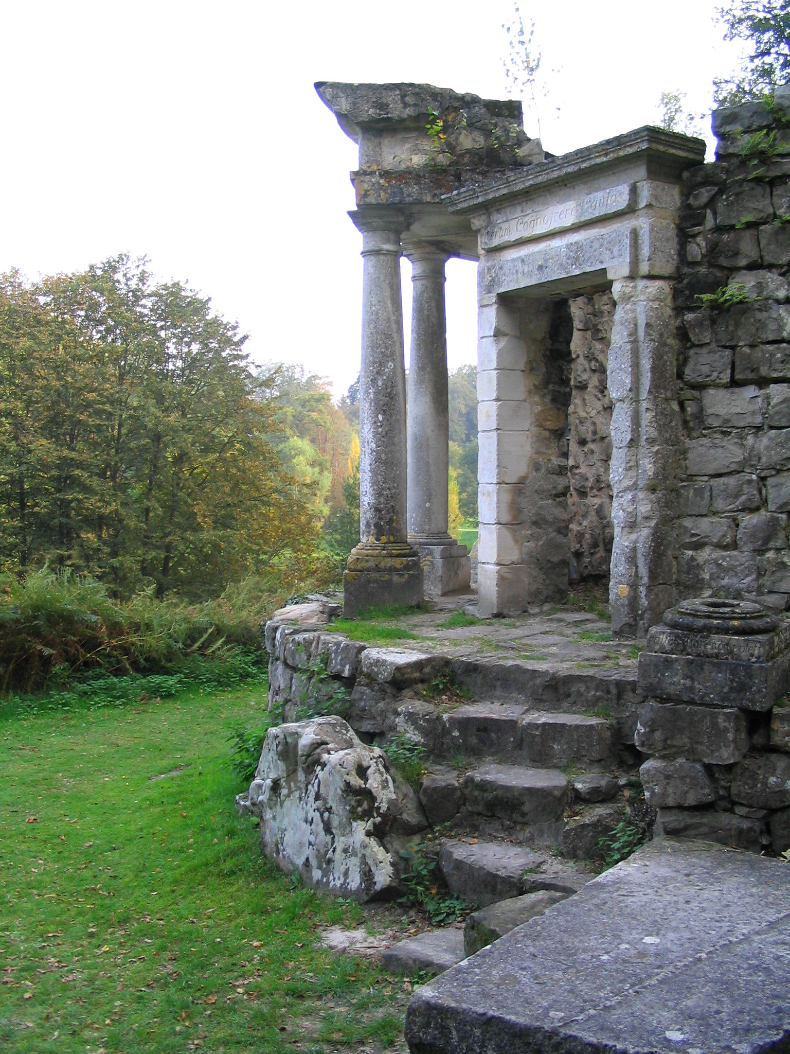 Temple de la Philosophie - Parc Jean-Jacques Rousseau - Ermenonville - France Auteur/author: P Charpiat - 2006